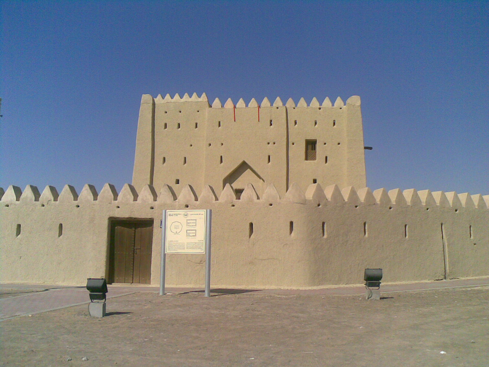 Al Rumailah Fort By Eng. Fadi Fayyadh Al Toubeh